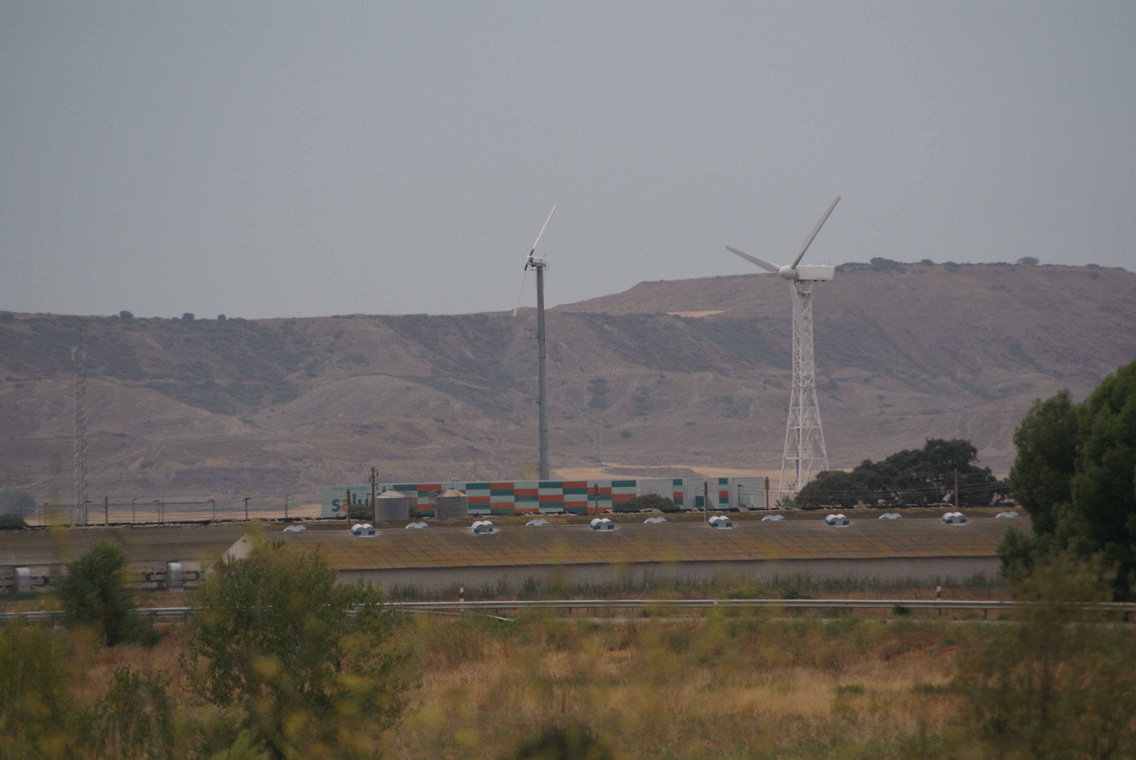 Diferentes generadores eólicos de la Fundación para el Desarrollo de las Tecnologías del Hidrógeno en Aragón